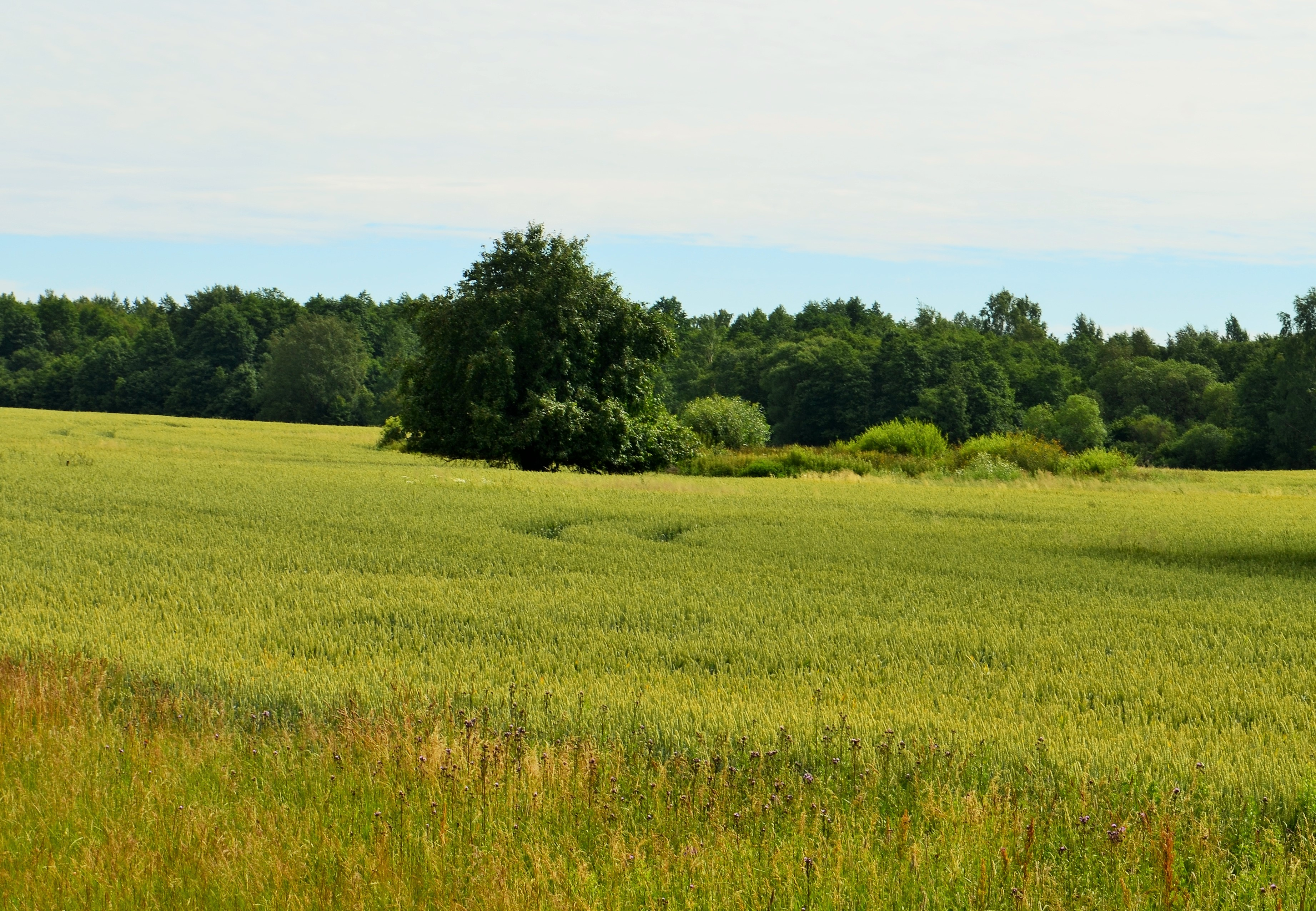 Sodybvietė, Šilainėliai, Kėdainių raj.